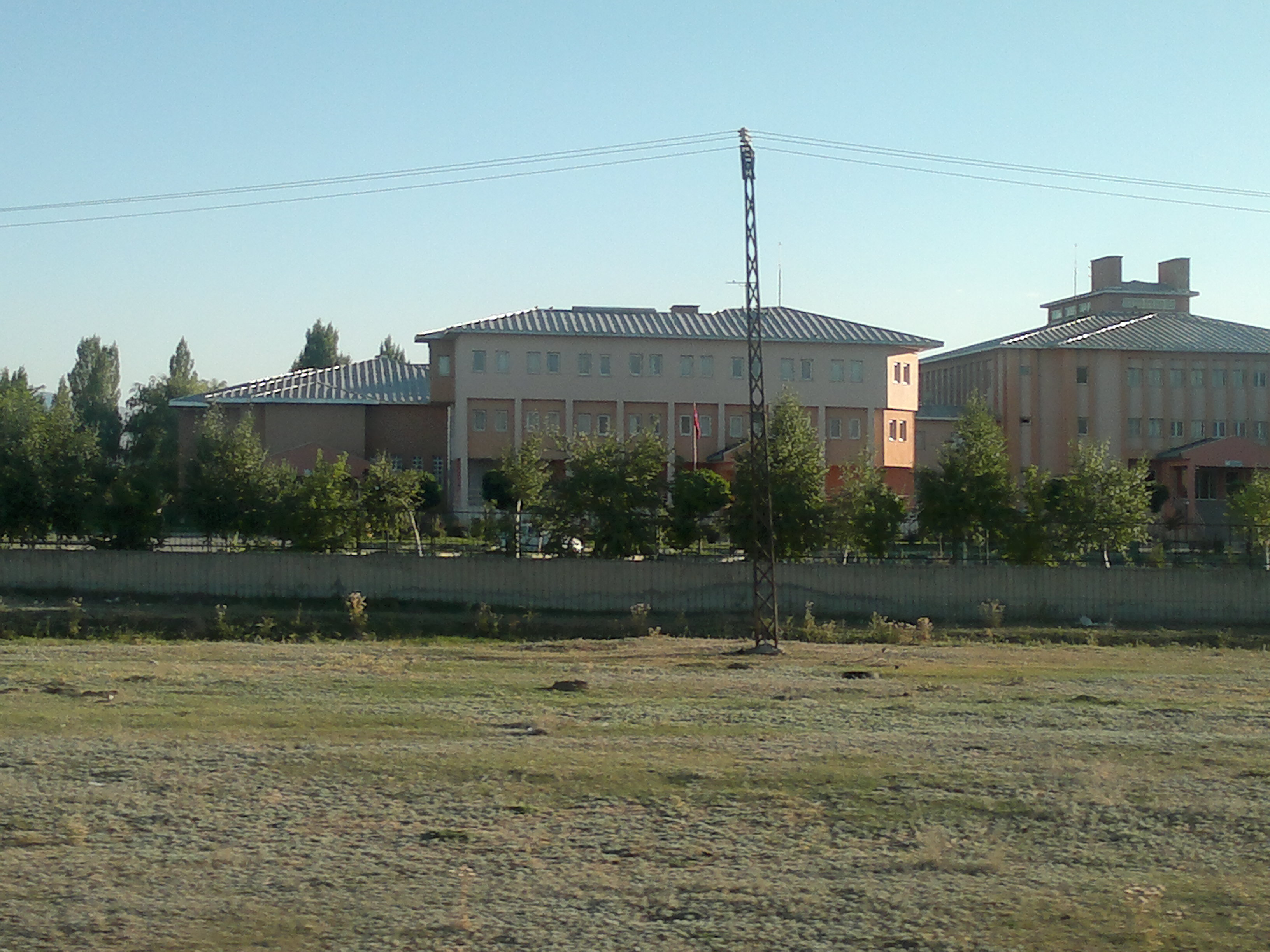 Erzurum Hizmetiçi Eğitim Enstitüsü